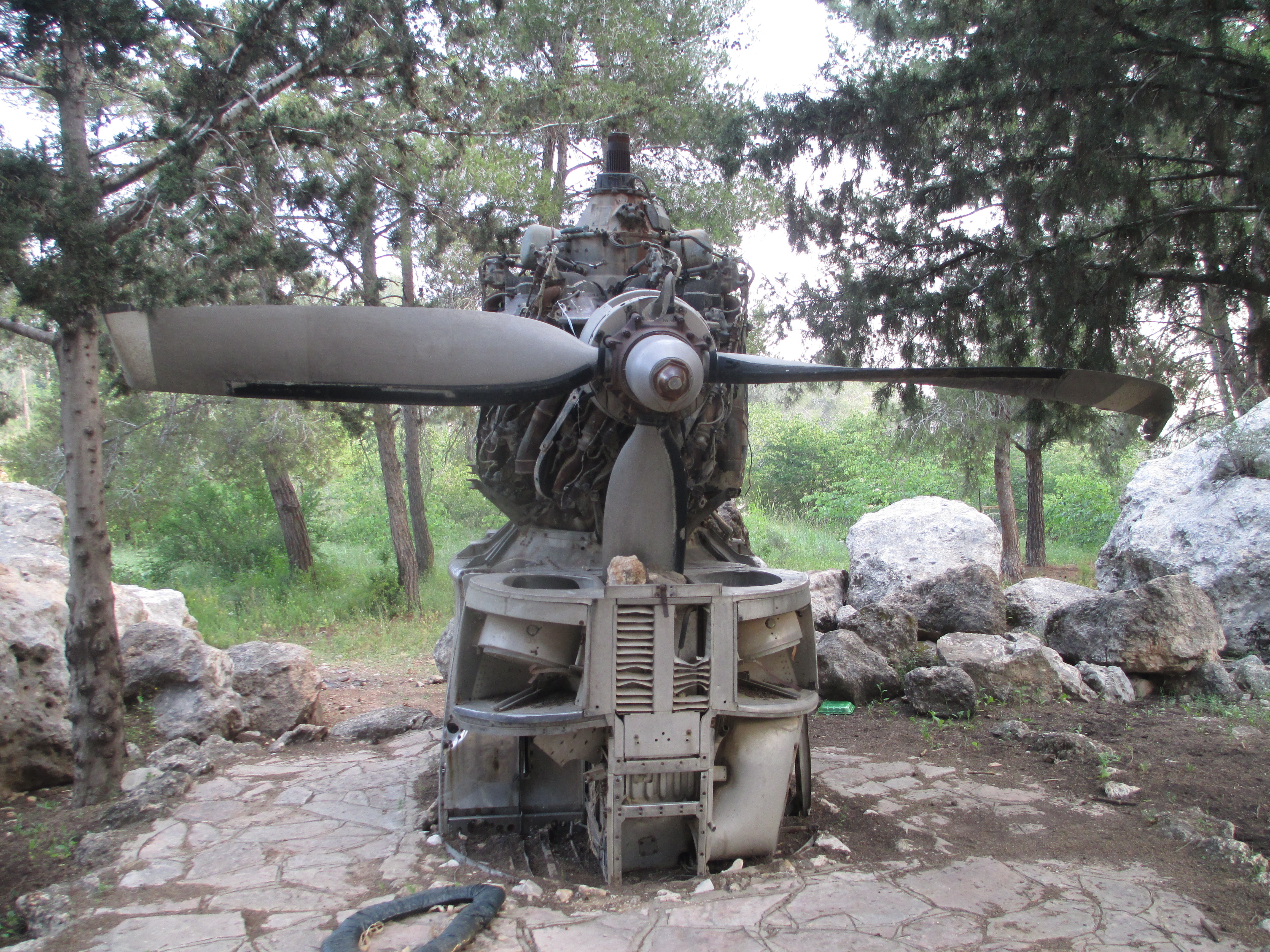 אנדרטה ביער בן שמן ל-7 אנשי צוות מטוס סטרטוקרוזר של חיל האוויר שהופל בסיני ב-17/9/71.